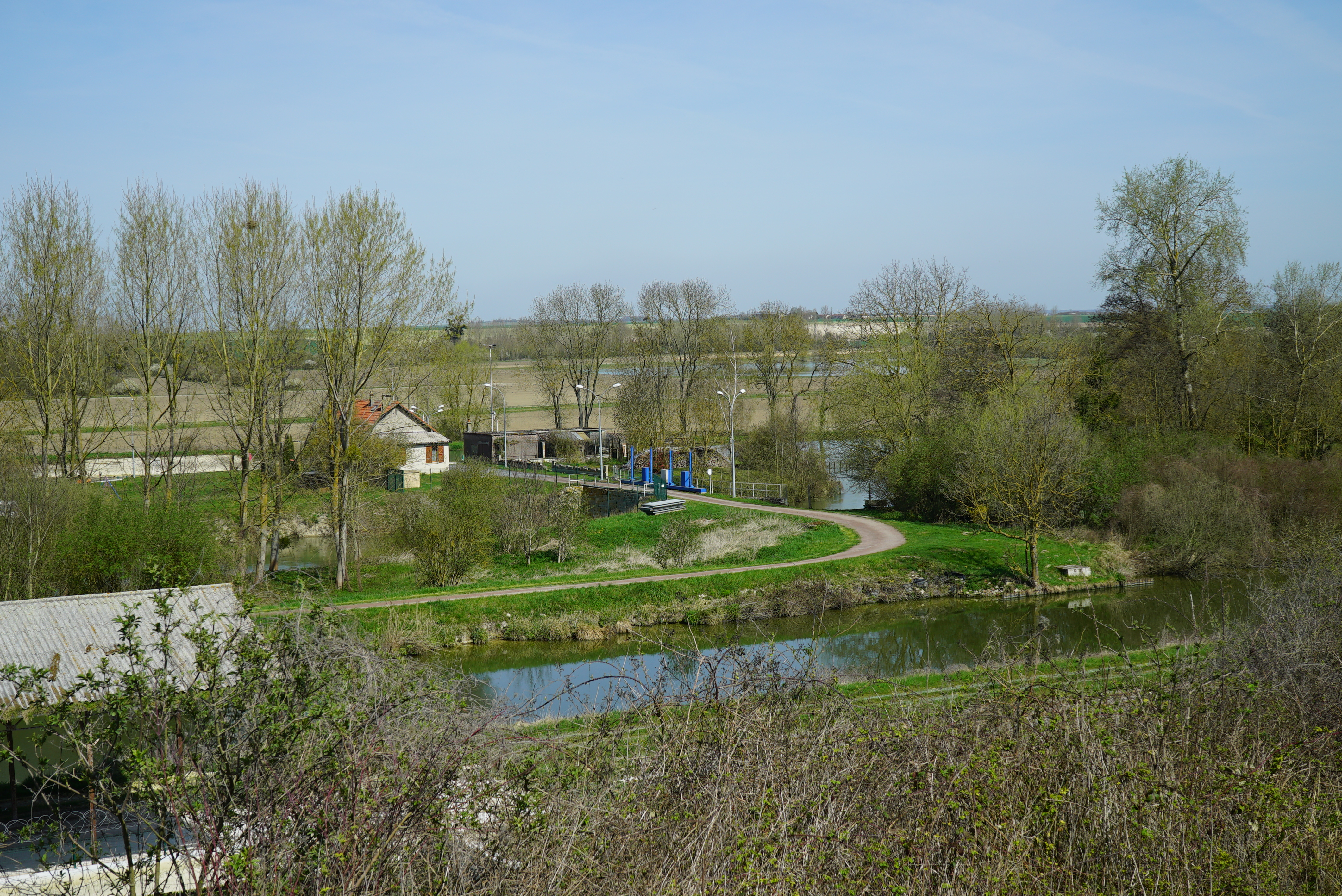 écluse sur le canal latéral à l'Aisne vue depuis la côte 108.